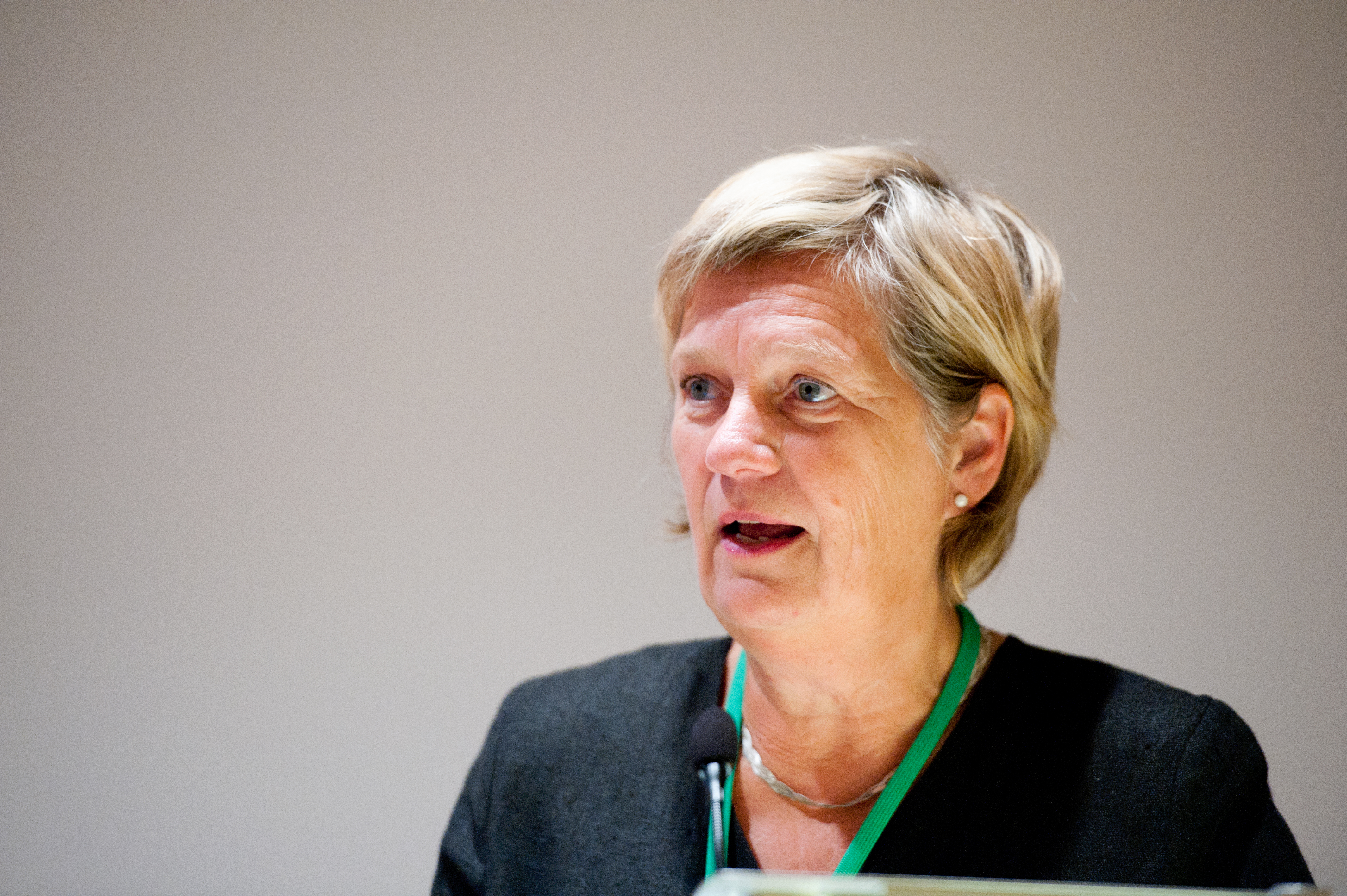 Anita Brodén, parlamentariker från Sverige, talar vid BSPC 20 i Helsingfors